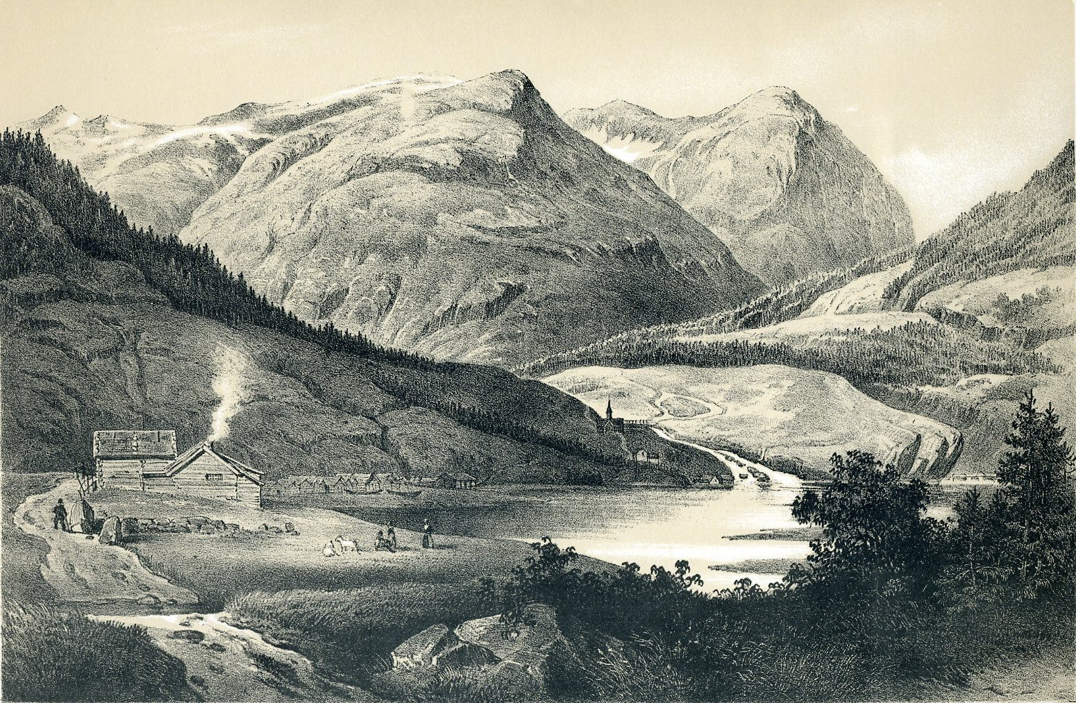 Sörelvens kirke paa Söndmöer, Calmeyer del. C. Müller lith. Em. Bærentzen & Co lith Inst. Illustrasjon hentet fra boken "Norge fremstillet i Tegninger" av Asbjørnsen, P.Chr. og utgitt av Chr. Tønsberg (no, 1848) Pictures from the Work "Norge fremstillet i Tegninger" 1848 by Chr. Tønsberg. Hellesylt, Stranda municipality, Møre og Romsdal county, Norway. T. Sønelvens Kirke i Søndmør